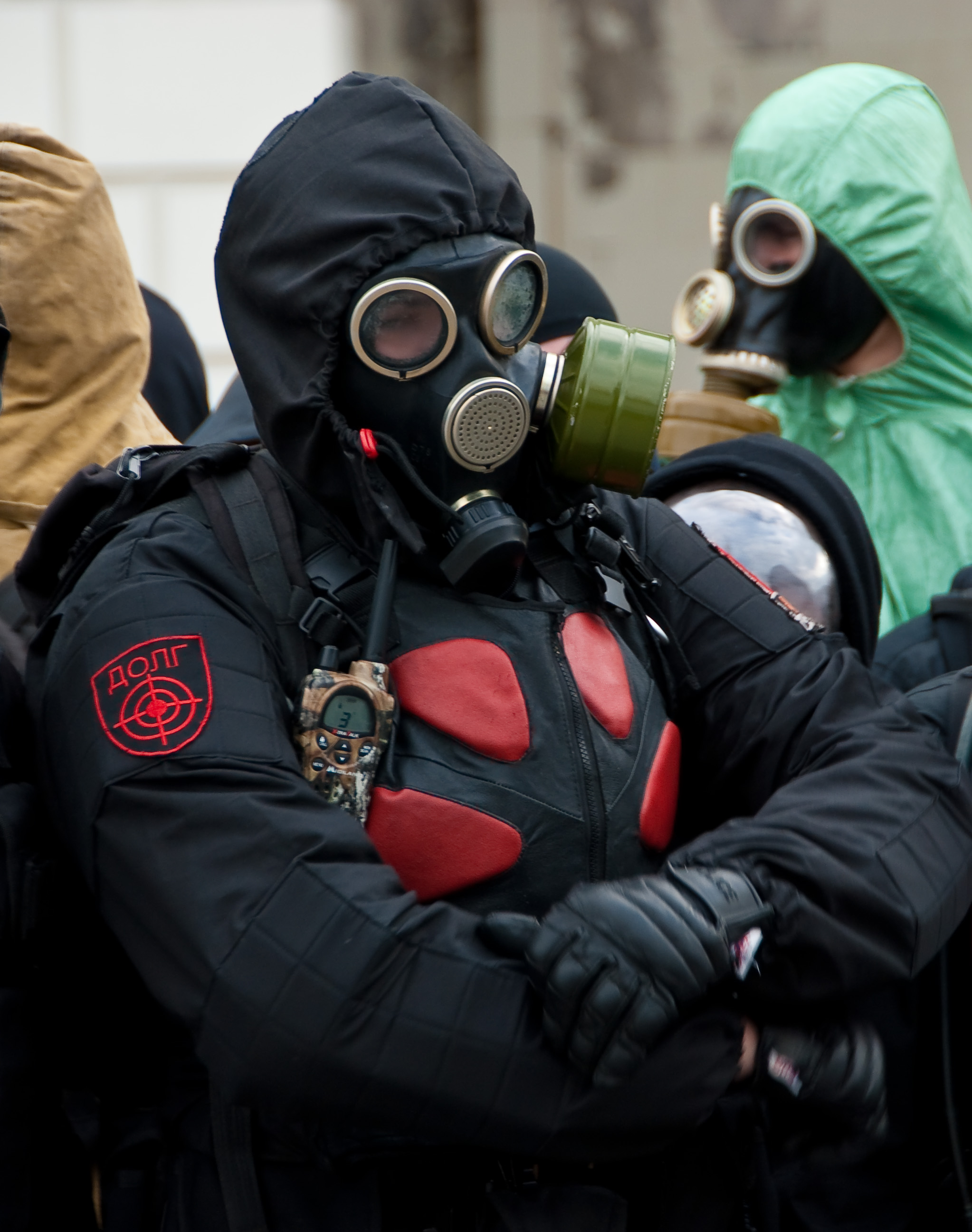 Stalker Fest 2009 in Kyiv